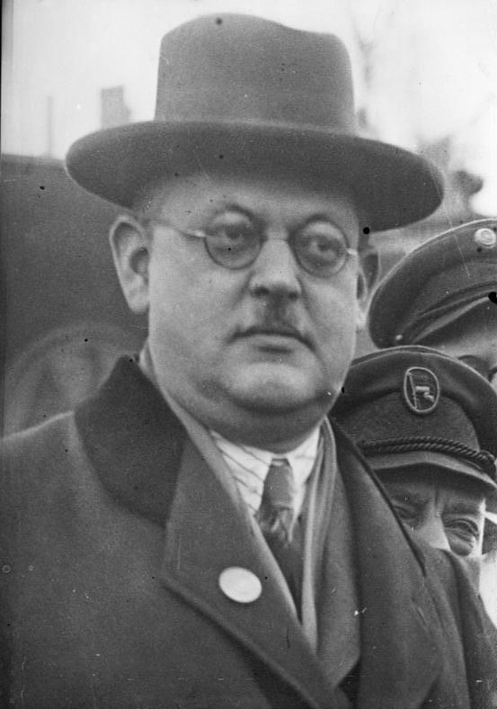 Zu der großen Sitzung der Sozialdemokratischen Fraktion in der Bewilligung des Panzerschiffes A.! Reichskanzler Hermann Müller, welcher sich für die Bewilligung des Panzerschiff A. aussprach und seiner Partei darüber Bericht erstattete.